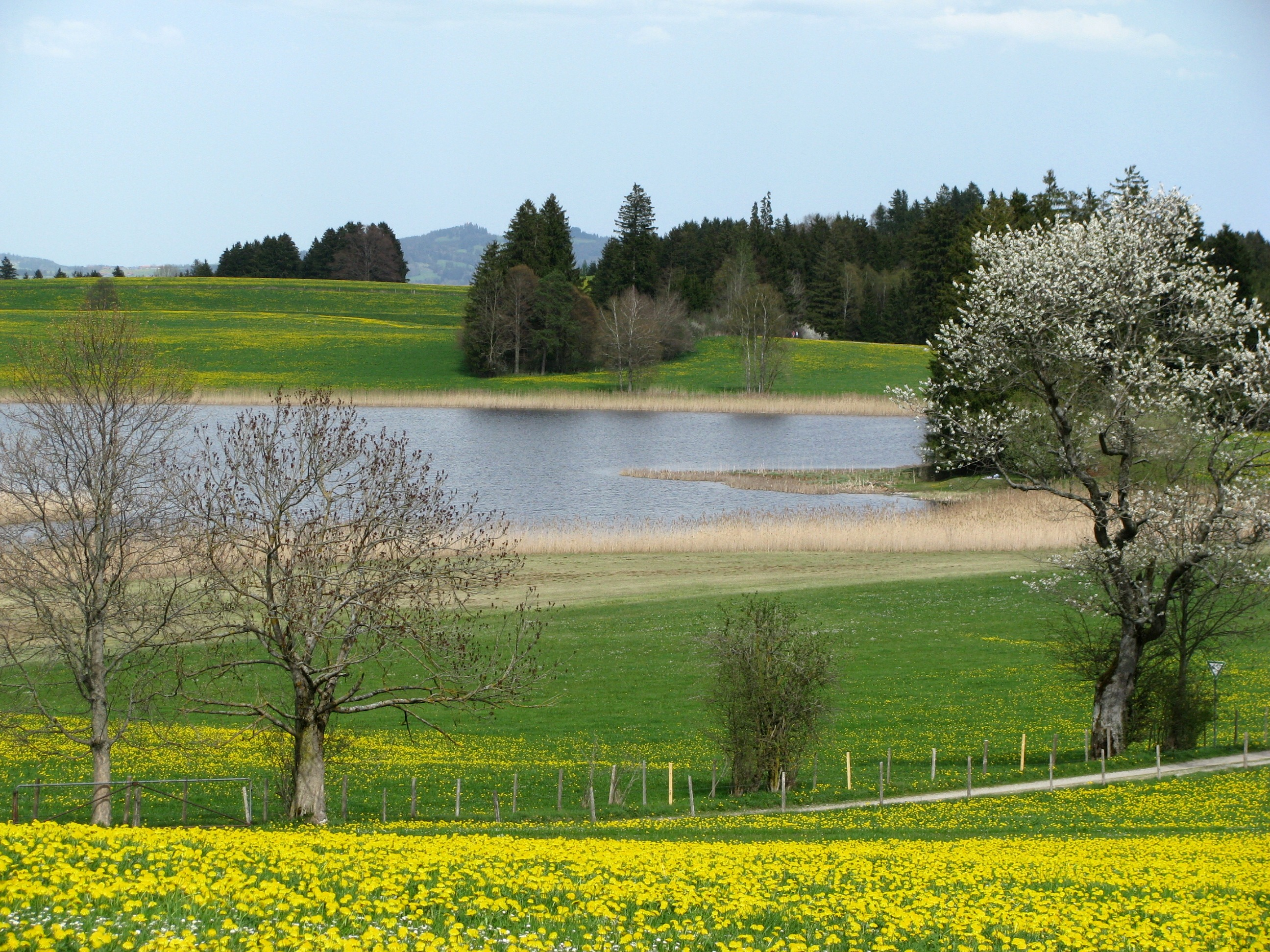 Trollweiher aus südwestlicher Richtung; im Hintergrund der Auerberg